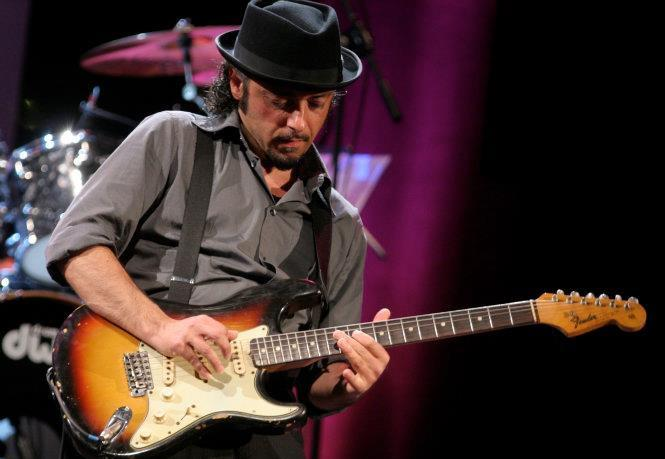 Foto scattata nel Teatro Verdi di Firenze nel 2005